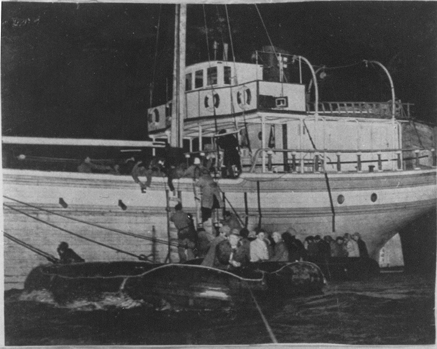 אוניית המעפילים לא תפחידונו